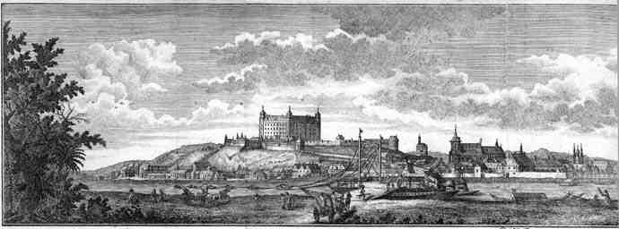 Bratislava 18. Jahrhundert